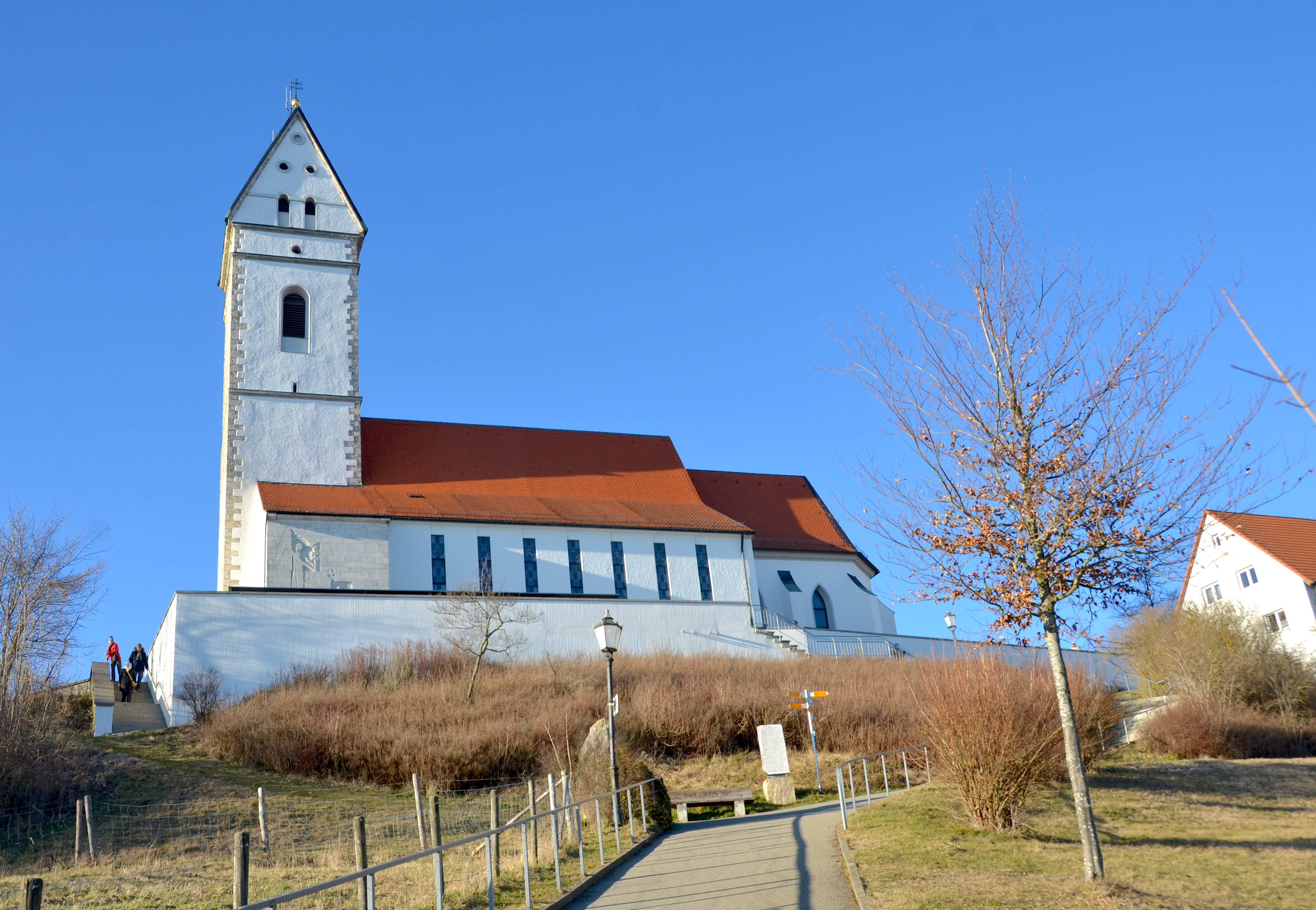 St. Johannes Baptist auf dem Bussen, Offingen (Uttenweiler)